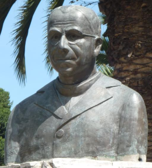 Busto de Aurelio Espinoza Pólit en la Biblioteca de su mismo nombre.